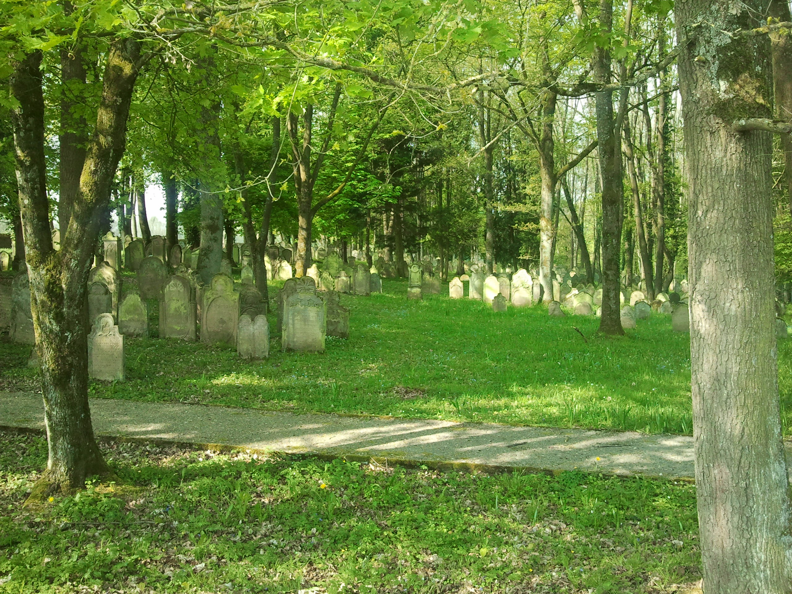 Jüdischer Friedhof in Bad Rappenau, Ortsteil Heinsheim Einer der größten und kunstgeschichtlich wertvollsten jüdischen Friedhöfe Deutschlands. Er ist wohl bereits im 16. Jahrhundert angelegt als sogenannter "Verbandsfriedhof" für ca. 25 jüdische Gemeinden der Umgebung angelegt worden und umfasst auf ca. 10.000 Quadratmetern 1.137 Grabstellen. Die letzte Beisetzung fand 1937 statt. Besucher der Anlage können den Schlüssel abholen bei der Stadtverwaltung Bad Rappenau Bürgerbüro Kirchplatz 4 74906 Bad Rappenau Tel. 07264/922-0